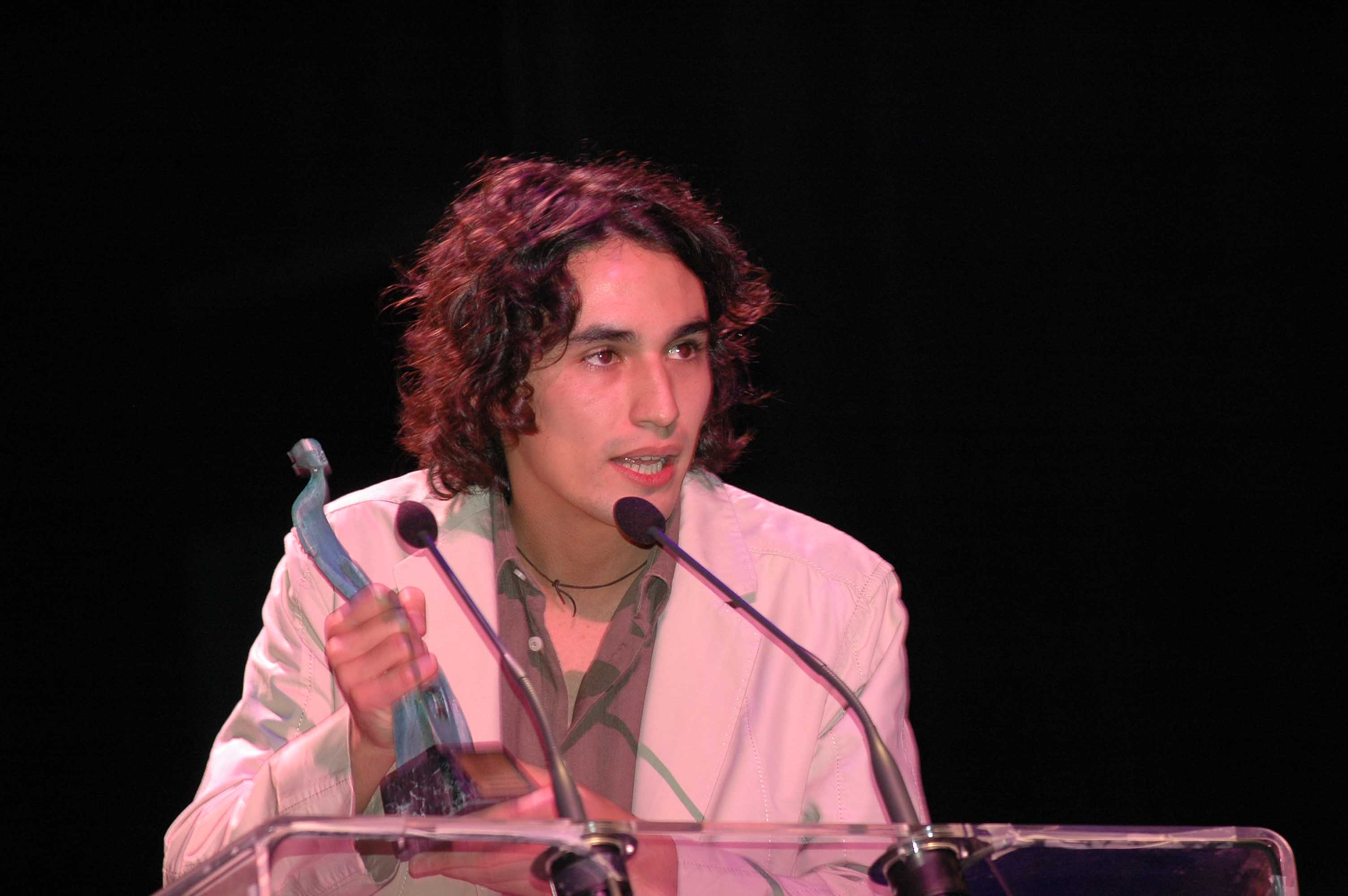 El realizador boliviano Martín Boulocq recibiendo el premio a mejor opera prima en el Festival de Cine de Guadalajara el año 2006.